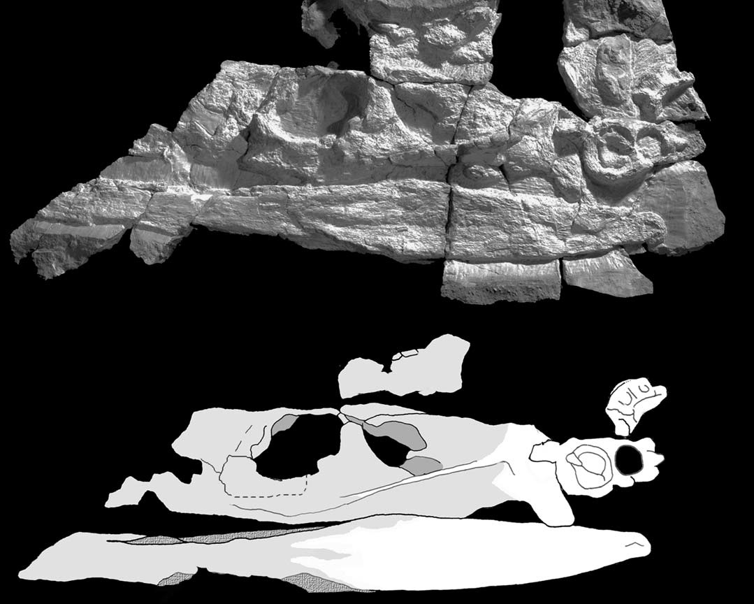 Partial skull and anterior cervical vertebrae of unidentified pliosaurid plesiosaurian (MPPL 18797) from the uppermost Callovian–middle Oxfordian of Kaberlaba (Asiago, Italy), in left lateral view. Photograph (A) and explanatory drawing (B). White, preserved bone surfaces; dark grey, preserved margins of skull fenestrae; light grey, eroded bone surface; cross hatching, broken bone.